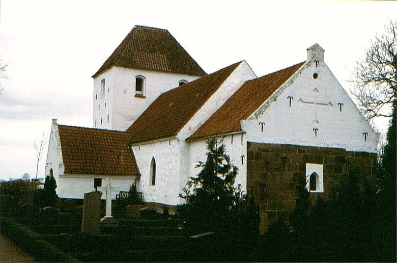 Ejlby Kirke i Danmark. Ejlby kirke